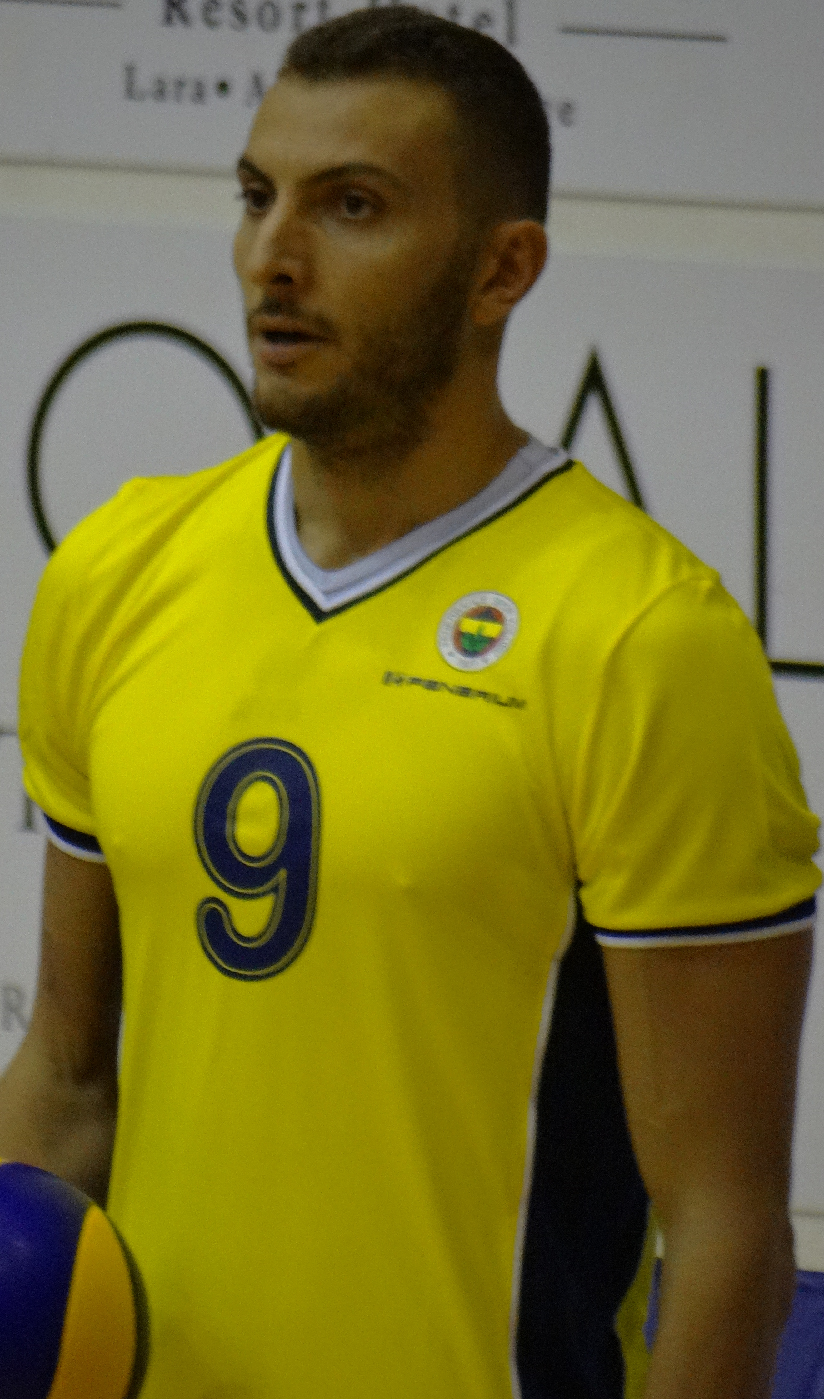 Resul Tekeli